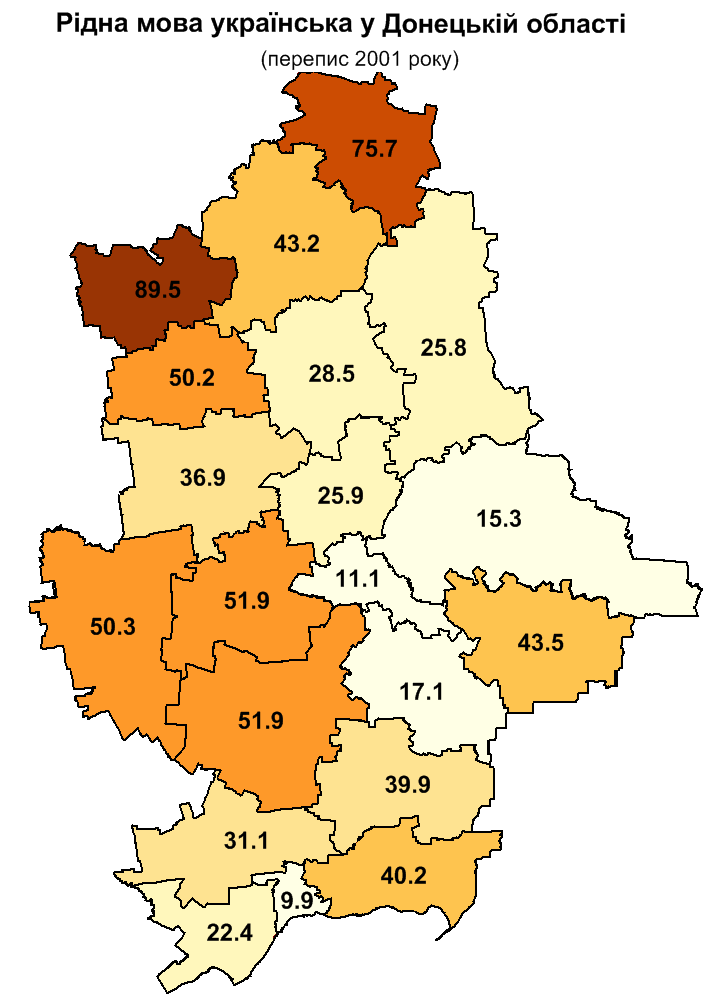 Рідна мова українська у Донецькій області за переписом 2001 р./ Ukrainian as native language in Donetsk oblast, 2001 census